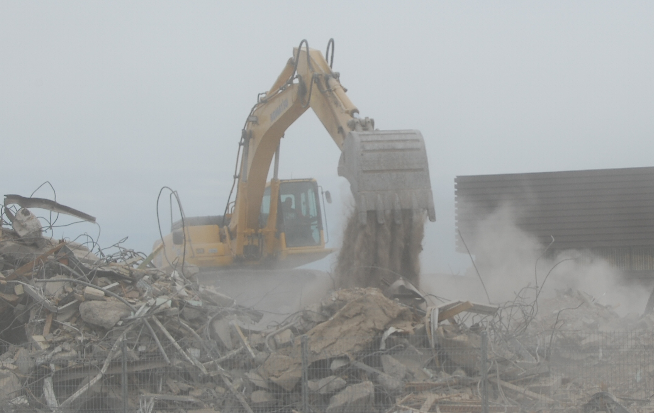 Pelle mécanique faisant de la démolition et du triage près d'Arvida (Saguenay), Québec.